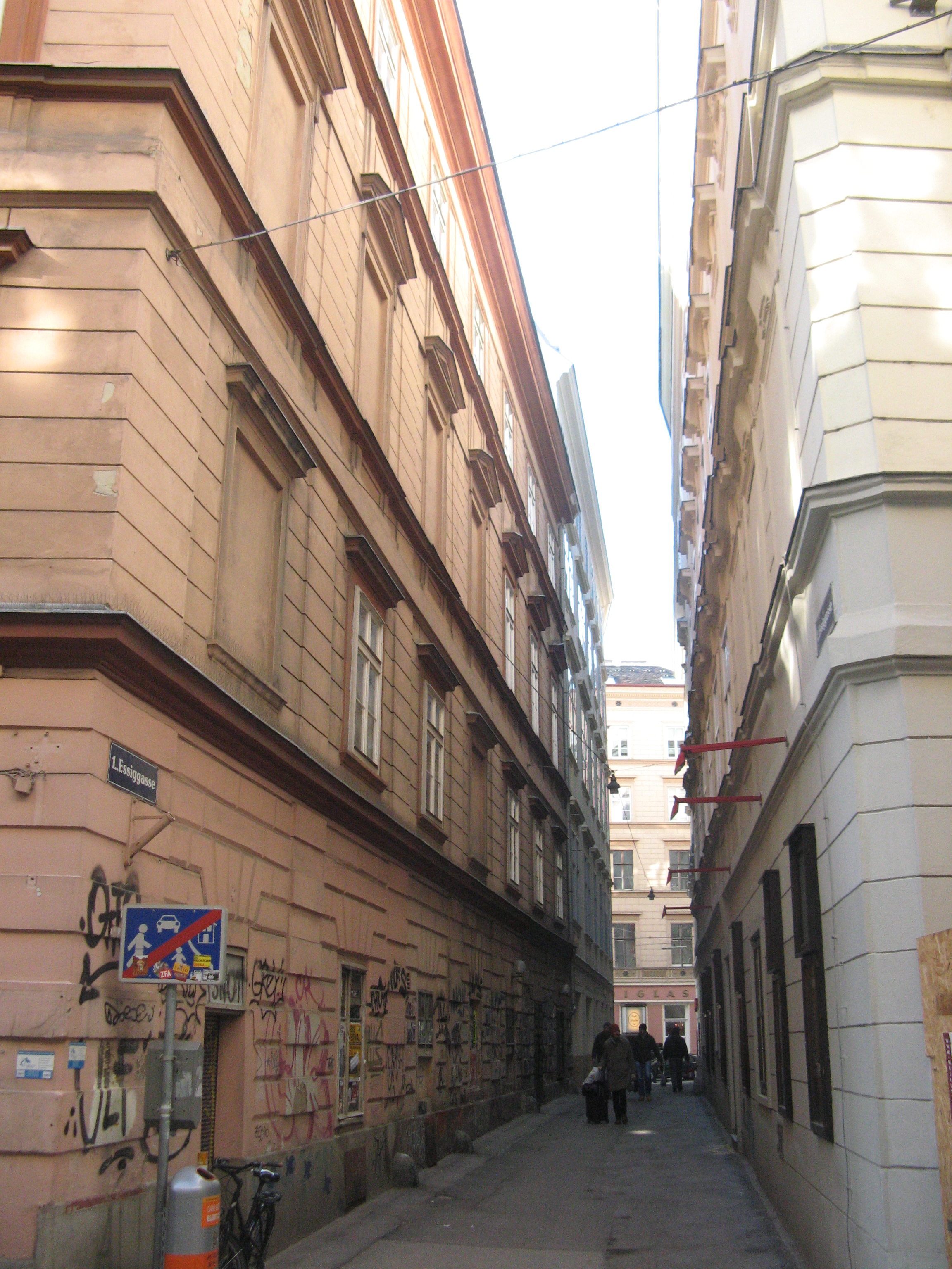 Essiggasse von der Bäckerstraße nach Süden, Wien-Innere Stadt